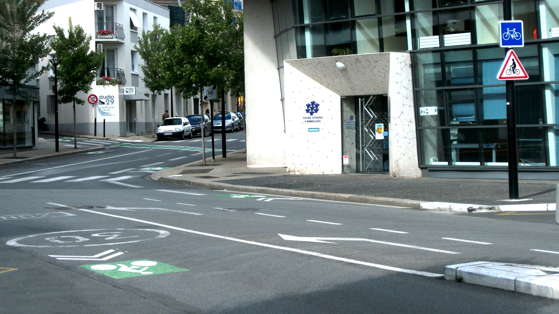 La place Charles de Gaulle, dans le sens Sud-Ouest - Nord-Est en direction de la Gare SNCF. Deux panneaux indiquent qu'il existe une piste ou bande cyclable sur quelques mètres et que des cyclistes peuvent déboucher sur la rue (en l'occurrence, la rue Laprugne dont l'accès est interdit aux véhicules à moteur).